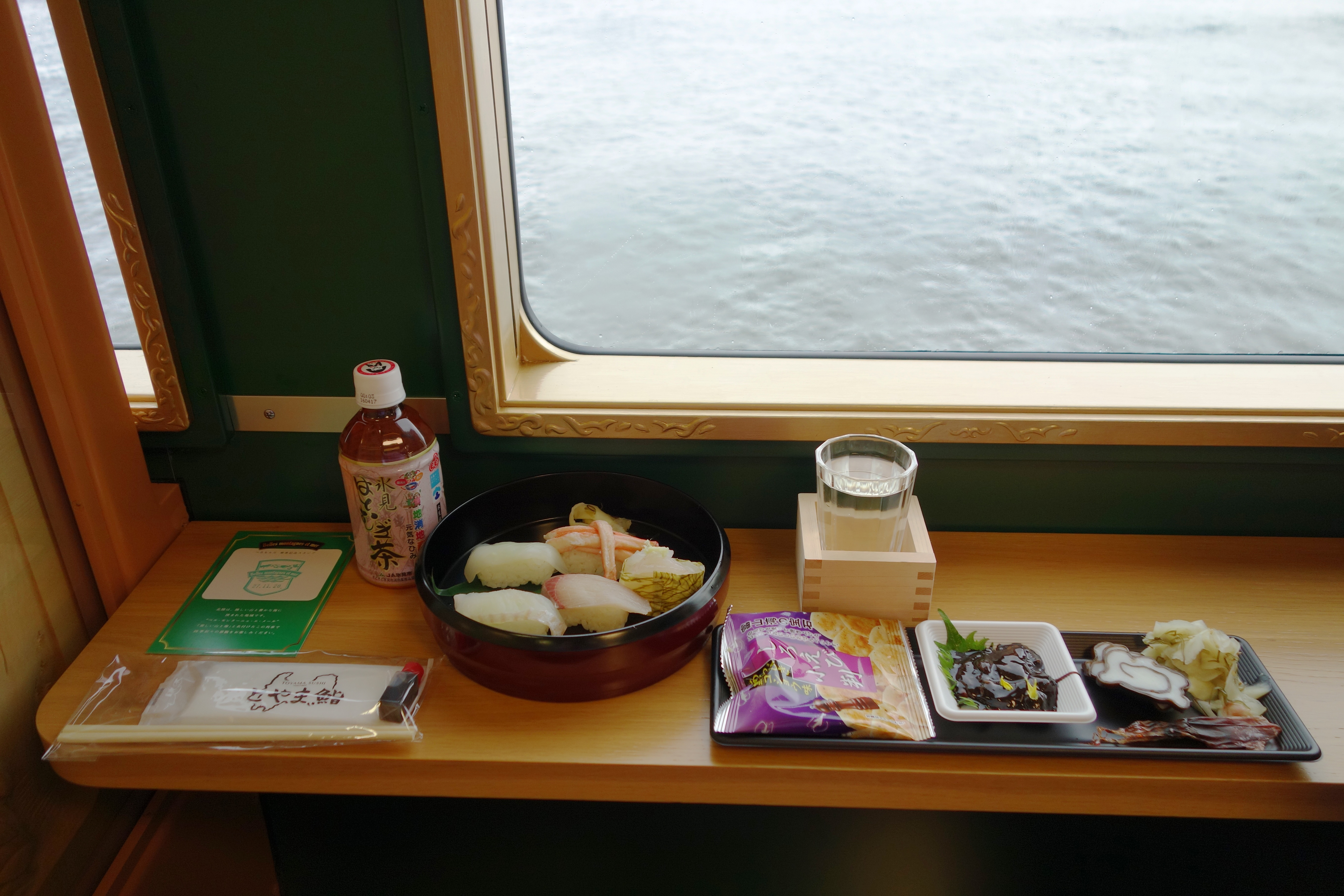 「べるもんた」の車内サービス（2015年11月）